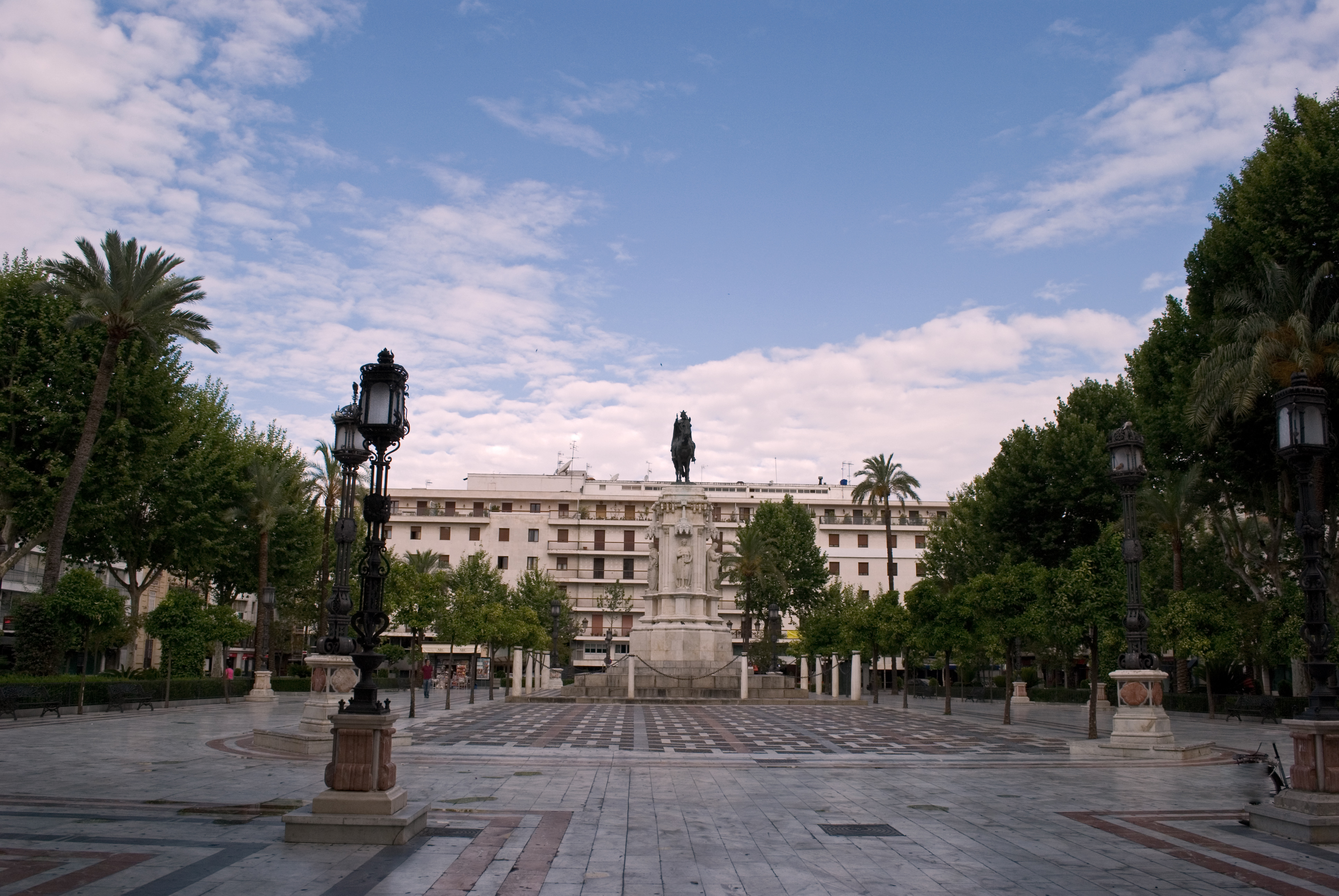 Plaza Nueva, Sevilla. En el centro el monumento al rey Fernando III